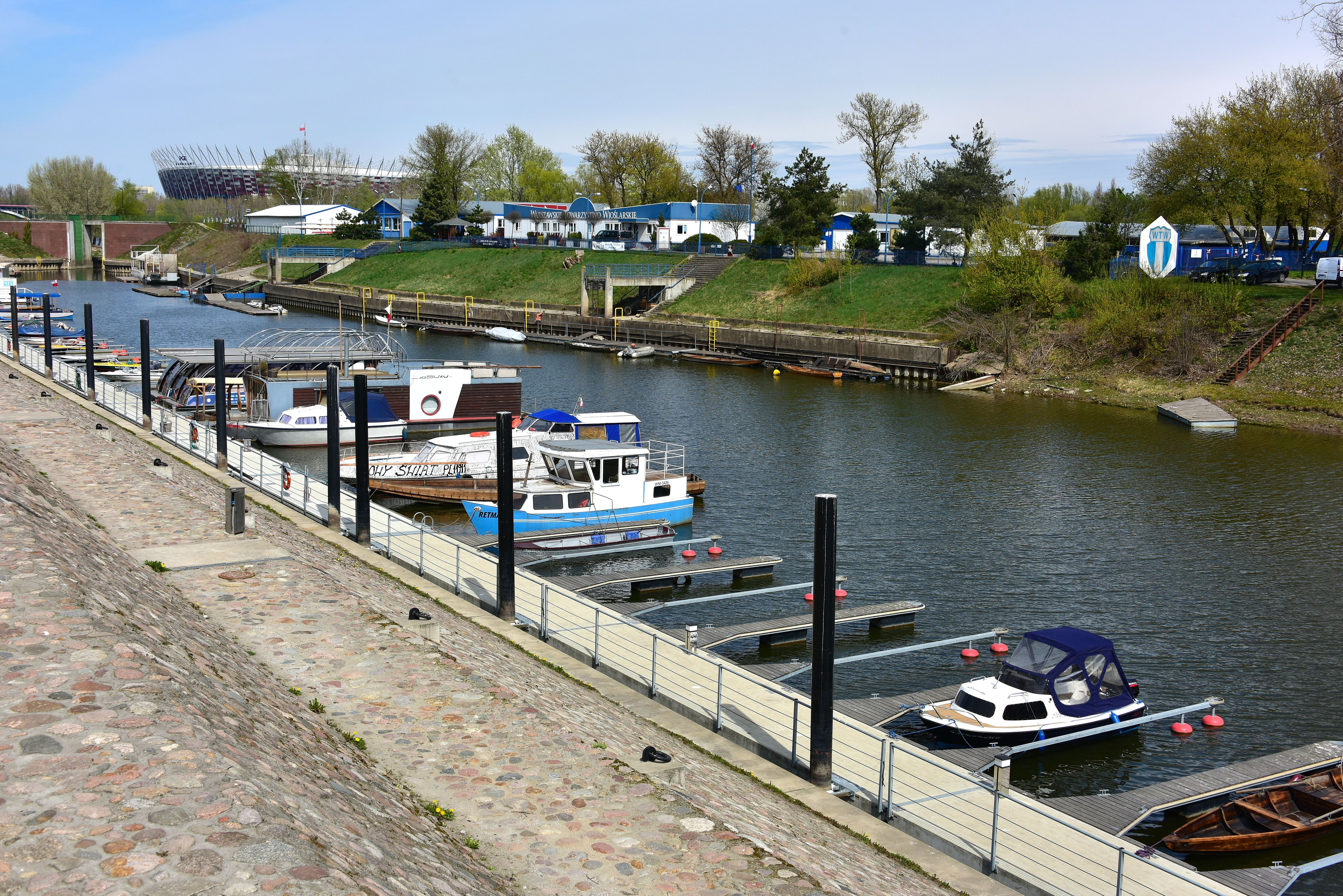 Port Czerniakowski w Warszawie